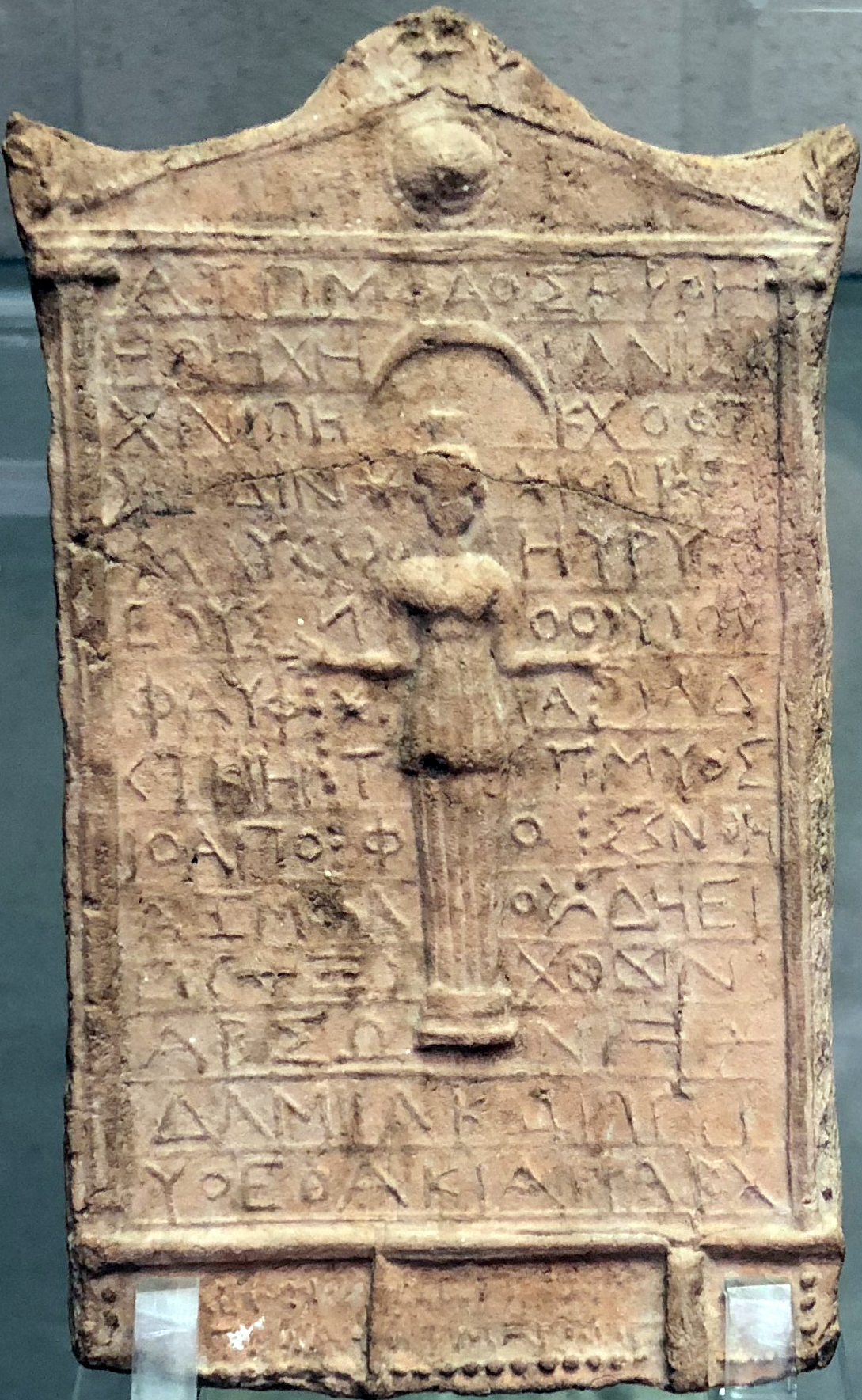 Artemide Efesia o Iside circondata da 14 linee di lettere greche incomprensibili alcune parole interpretabili come ebraiche. Dal porto piccolo di Siracusa. Età ellenistica.